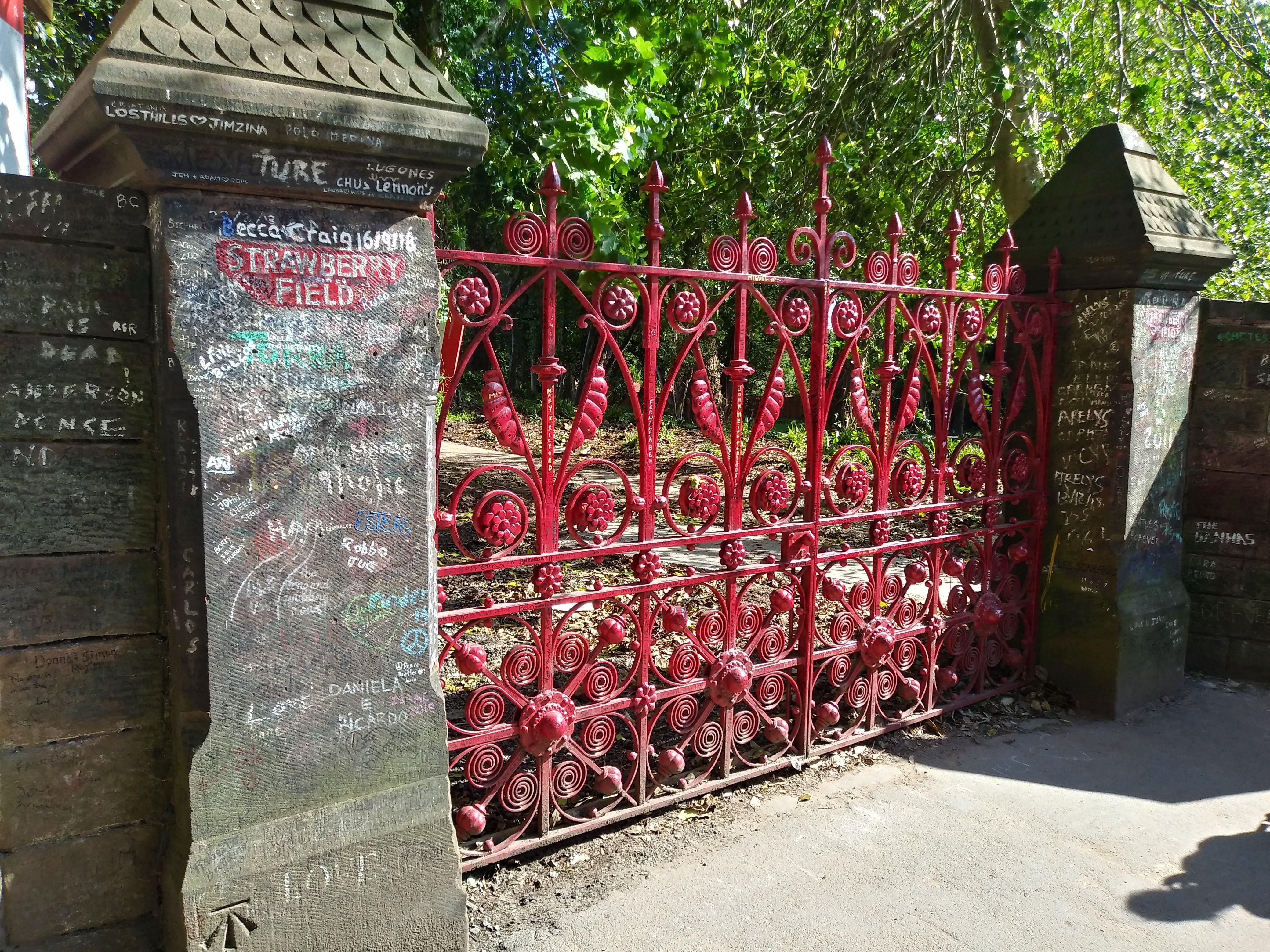 Strawberry fields es una famosa canción de The Beatles